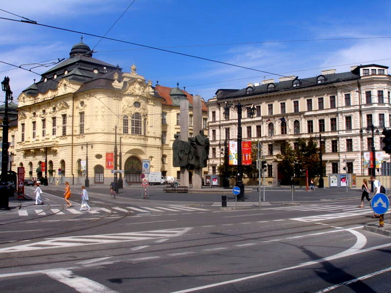 Vľavo Reduta, vpravo budova ministerstva životného prostredia.Bratislava